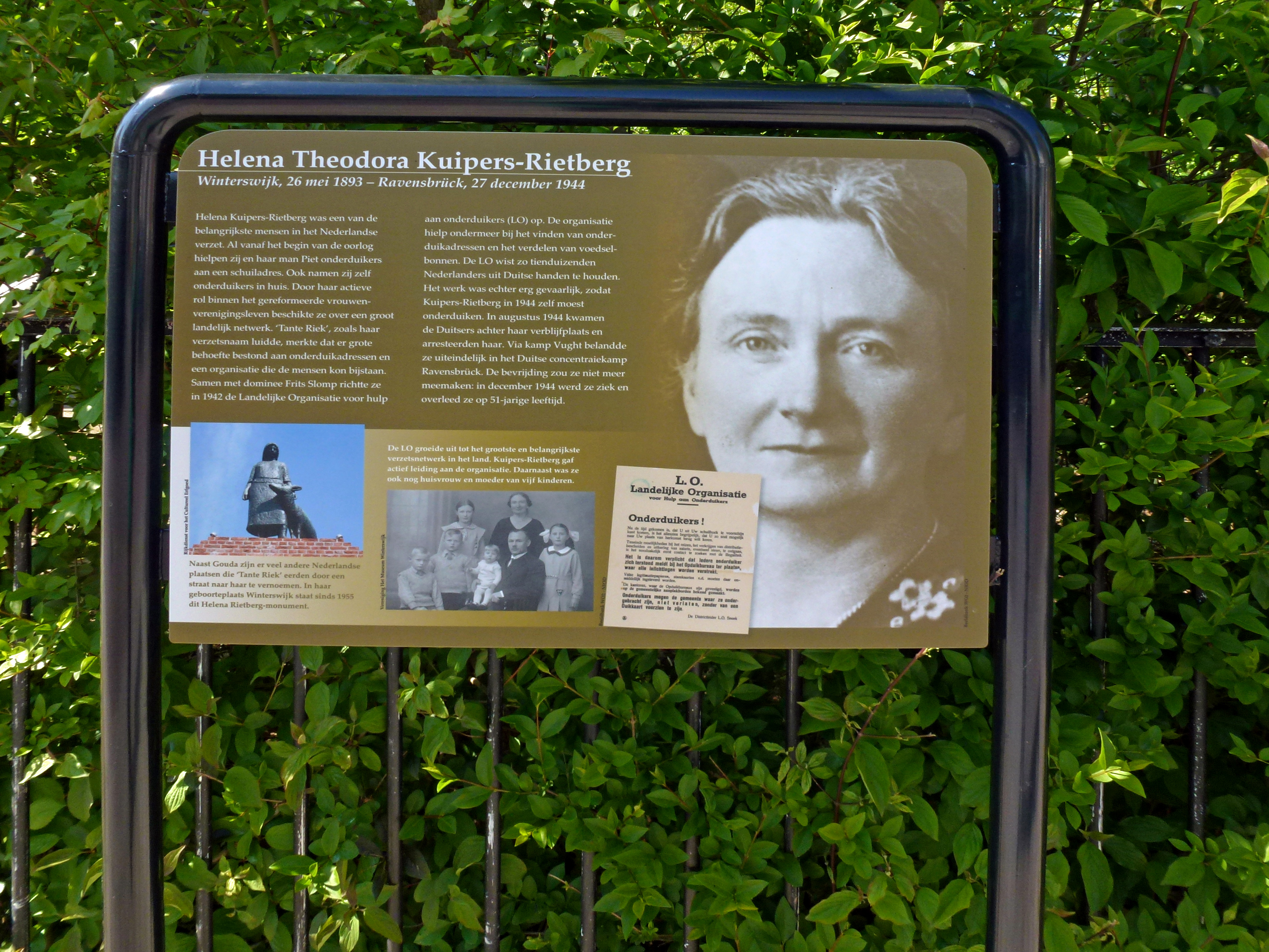 Verzetsheldin Helena Kuipers-Rietberg. Op 10 april 2014 zijn in Oosterwei 10 van in totaal 16 borden met informatie over verzetsstrijders onthuld. In Oosterwei, een wijk in Gouda, zijn na de 2e wereldoorlog, de wederopbouw, 16 straten vernoemd naar verzetsstrijders. Veel bewoners van deze straten wisten maar weinig over de verzetshelden waarnaar de straten vernoemd zijn. Zij en anderen hebben er voor gezorgd dat nu in iedere straat een informatiebord staat, zodat de gedachtenis aan deze strijders levend blijft. (De overige 6 borden zijn in april 2018 geplaatst)